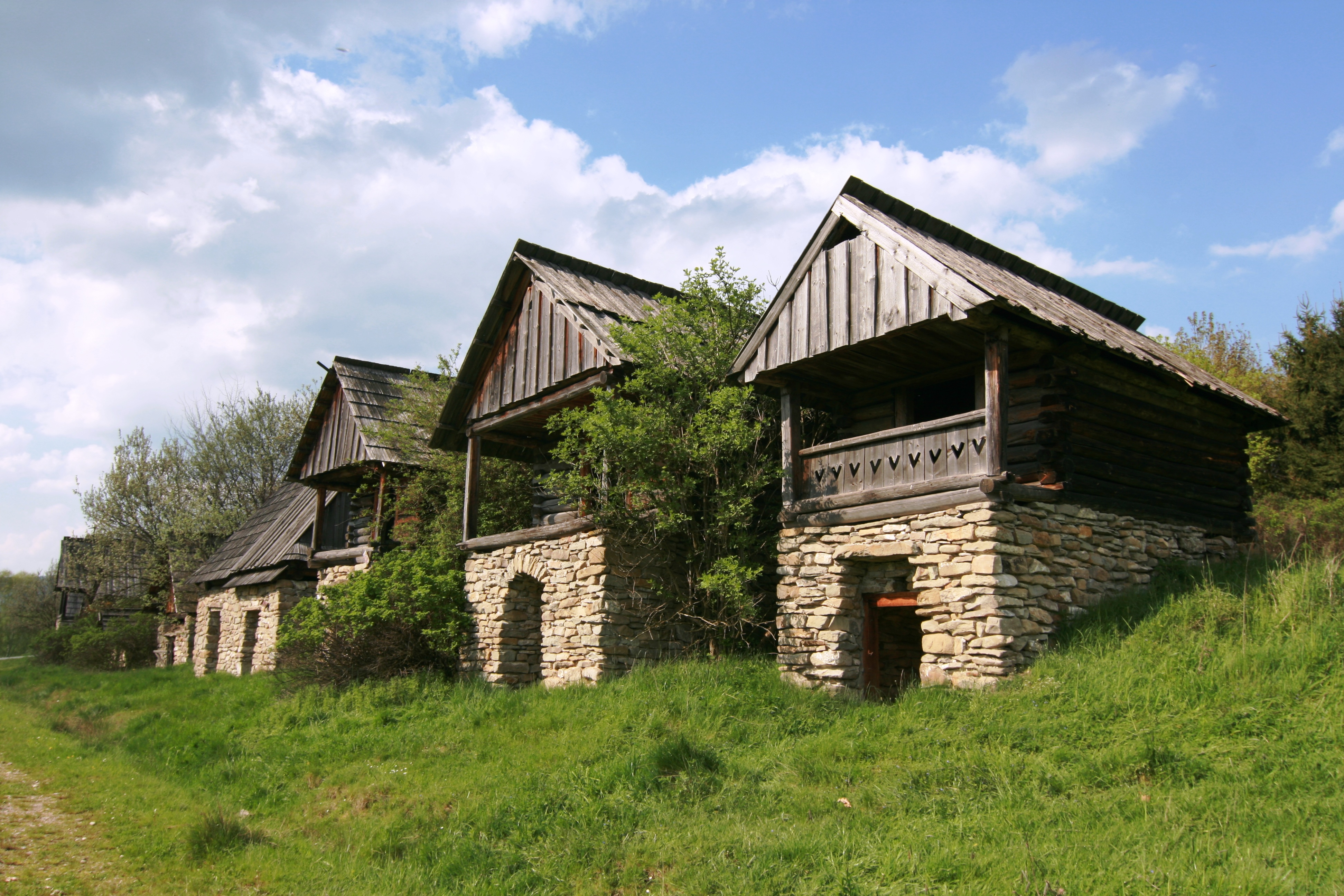 Piwniczki w Osadzie Czorsztyn - część wschodnia